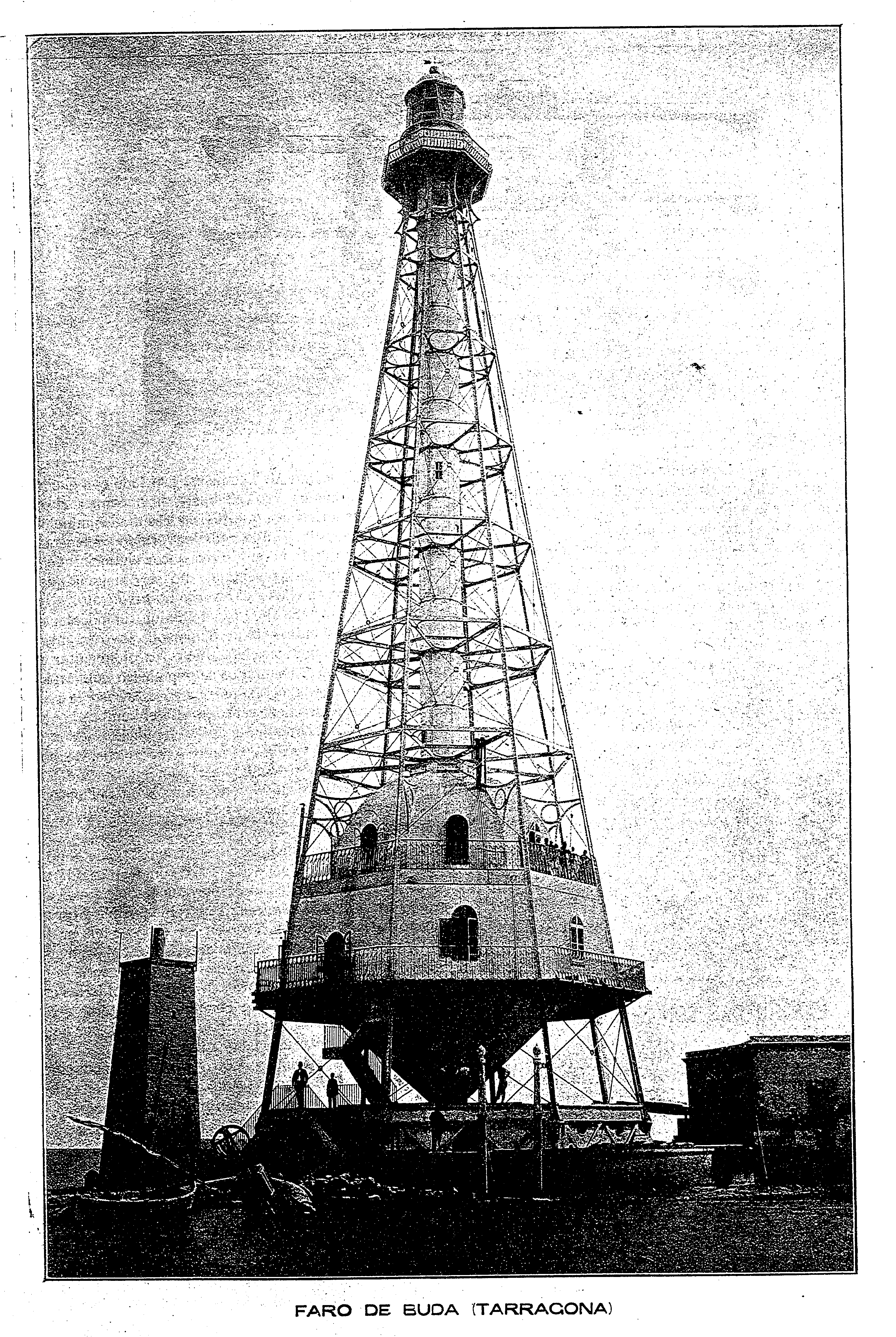 Faro de Buda según fotografia aparecida en La Revista de Obras Públicas